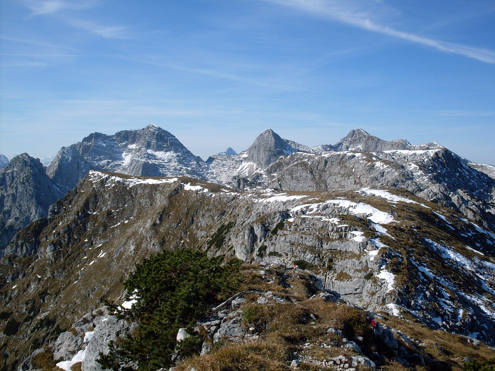 Blick vom Schottmalhorn (2045 m) auf die Hauptgipfel der Reiter Alm: Stadelhorn (links), Wagendrischelhorn (Mitte), Gr. Häuselhorn (rechts). Im Hintergrund zwischen Stadel- und Wagendrischelhorn das Ochsenhorn in den Loferer Steinbergen.